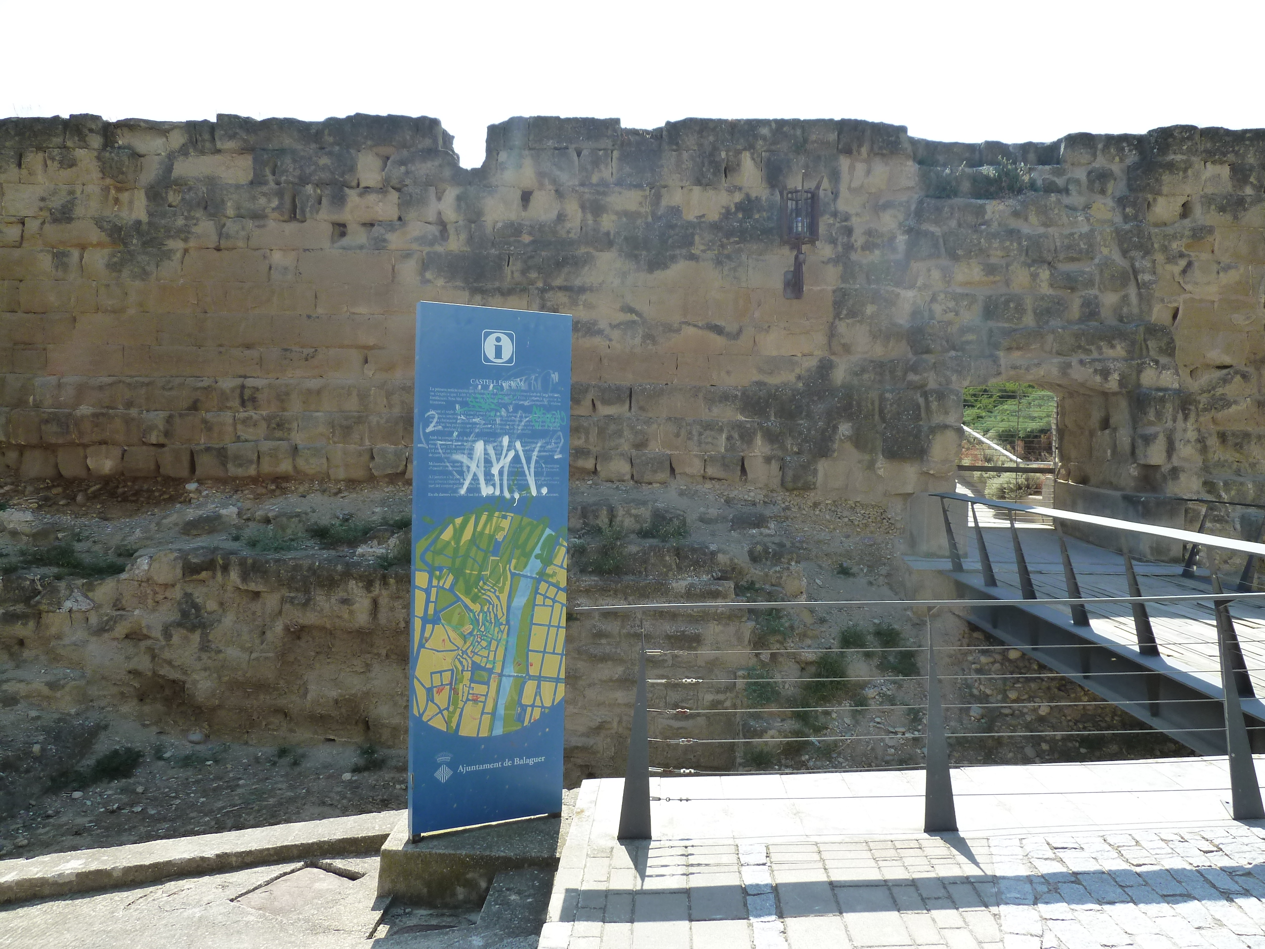 Balaguer